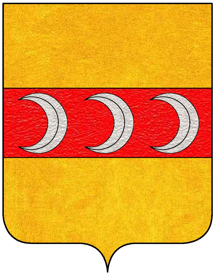 Stemma della famiglia Strozzi